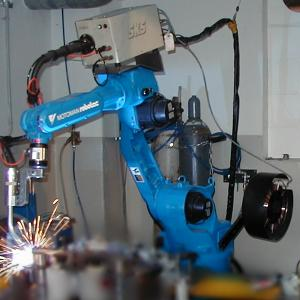 Gelenkarmroboter mit Schweißbrenner Foto: H. Weihe, 2000, Lizenz: Public Domain